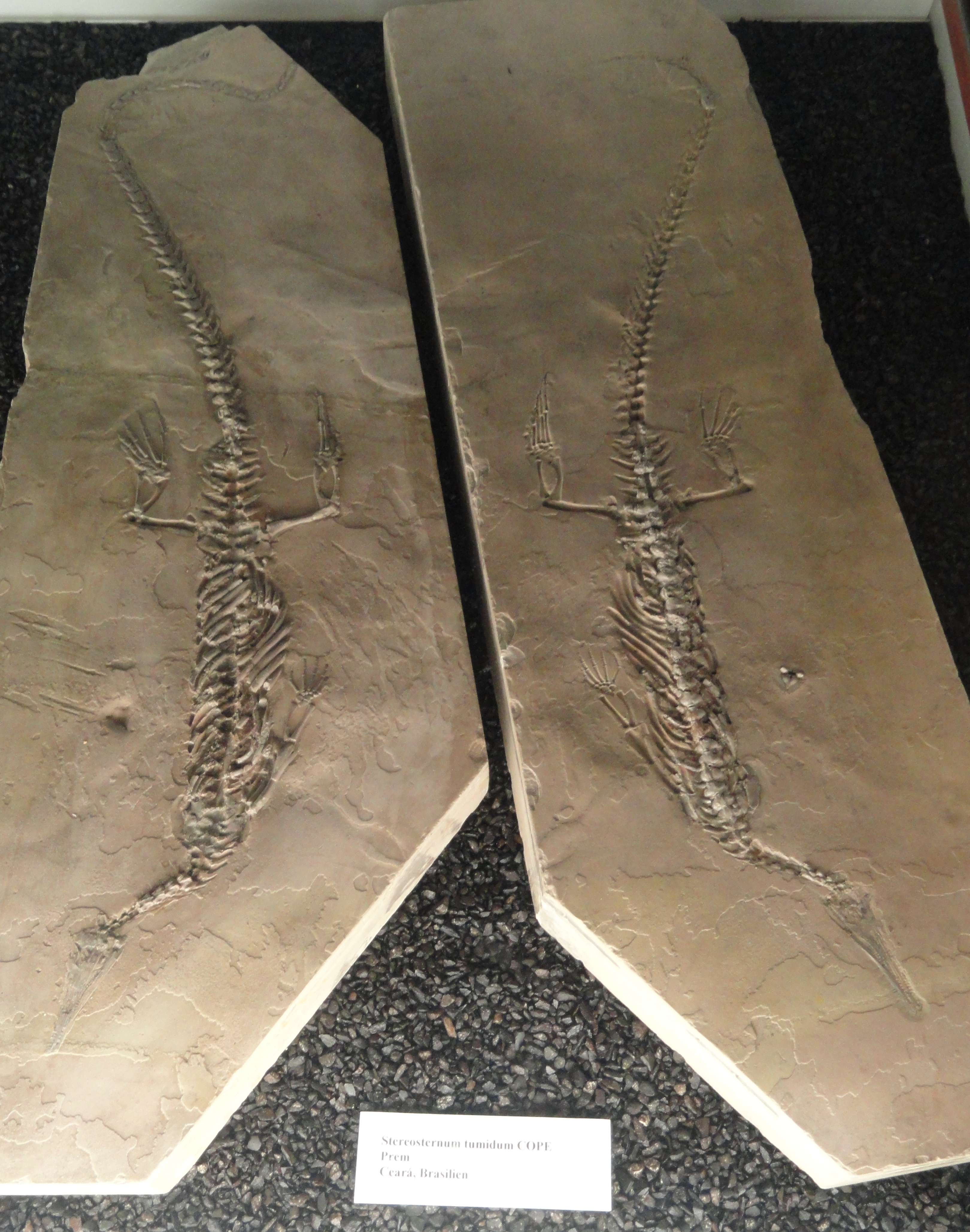 Exhibit in Naturmuseum Senckenberg, Frankfurt am Main, Germany.